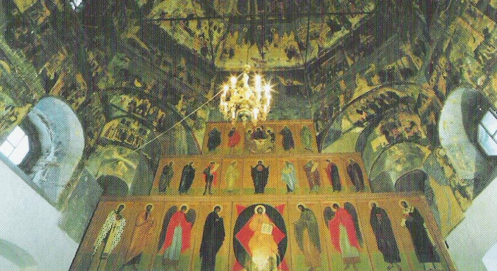 Интерьер церкви Покрова на Козлёне в Вологде